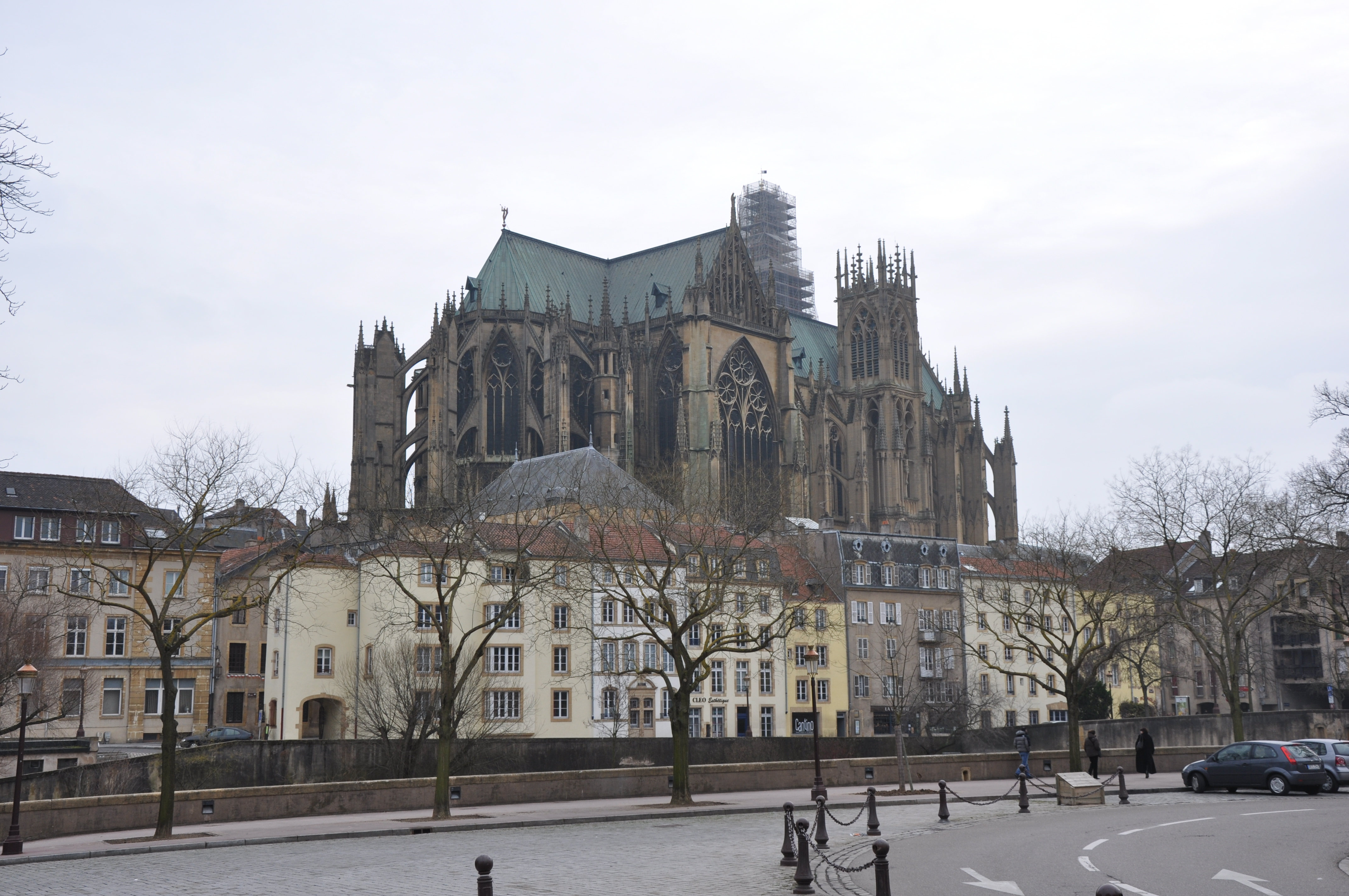 Cathédrale Saint-Étienne de Metz, Metz, Lorraine, France